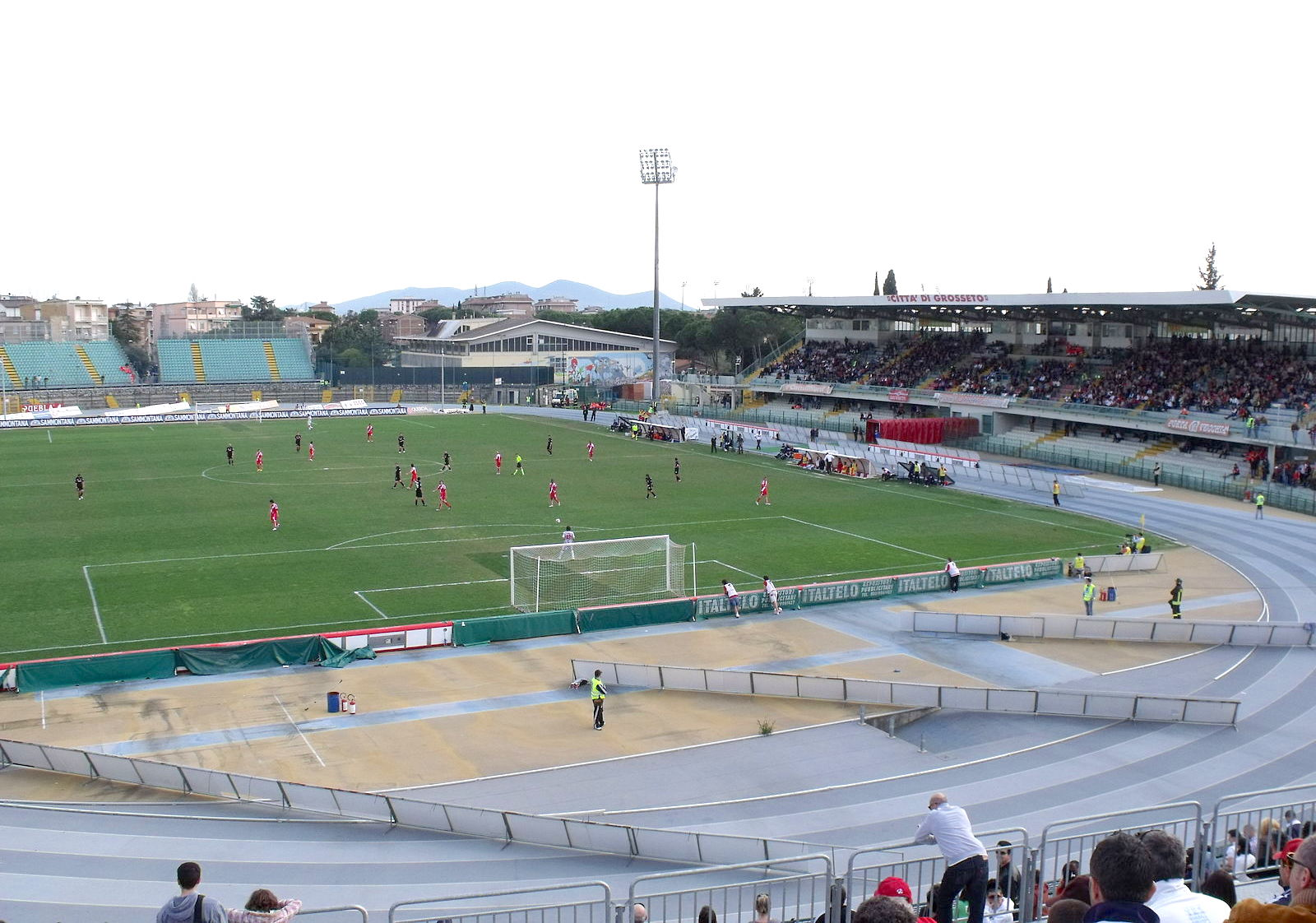 Stadio Carlo Zecchini di Grosseto visto dalla Curva Nord